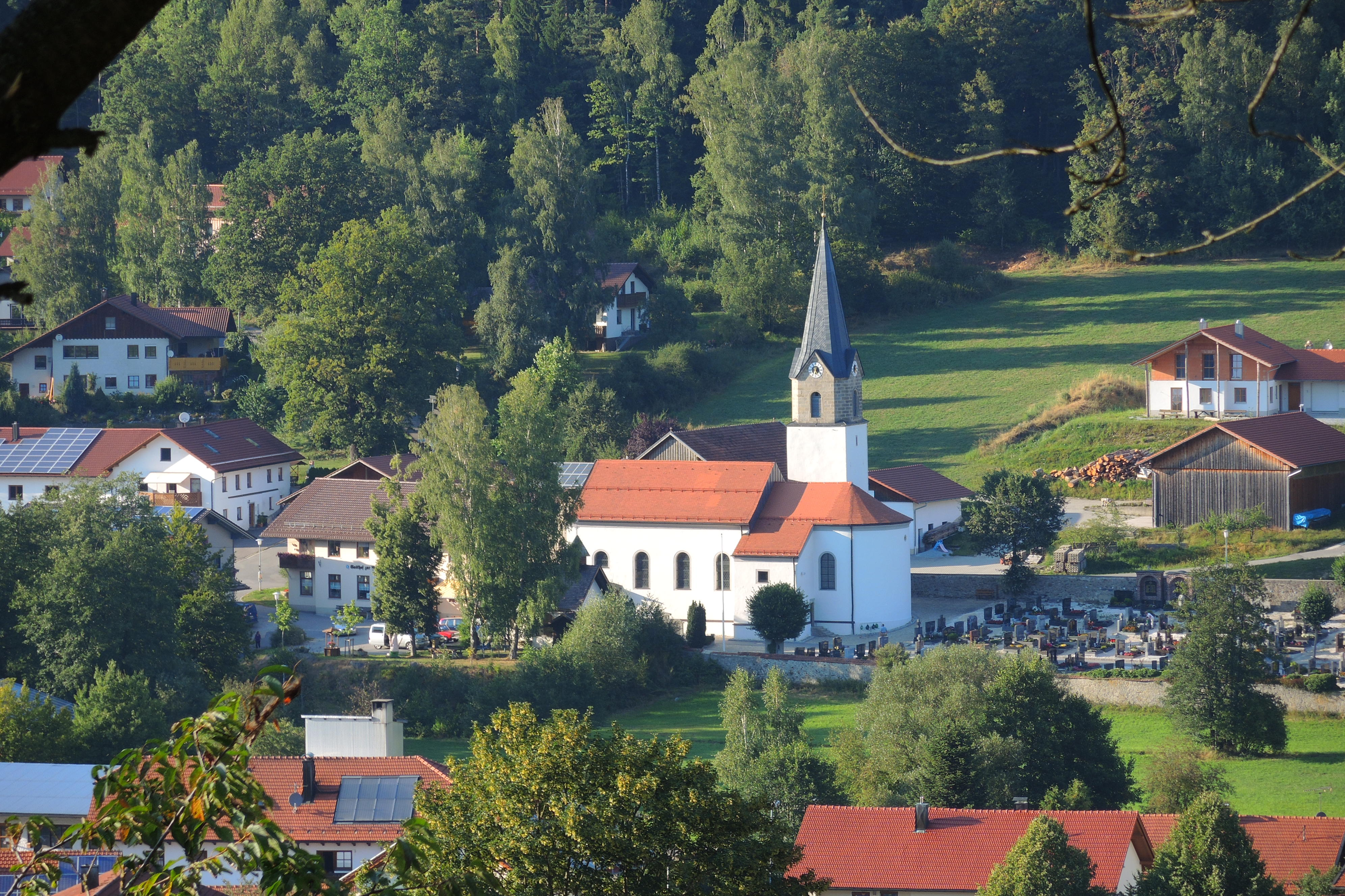 Achslach im Bayerischen Wald, Landkreis Regen